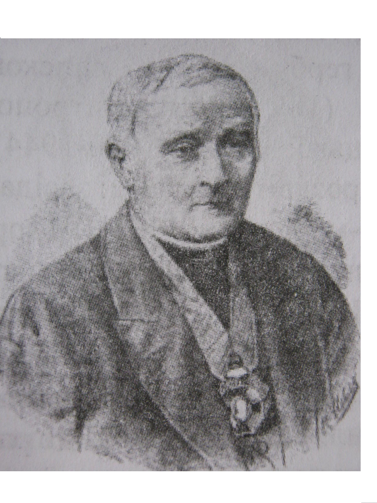 Григорій Шашкевич